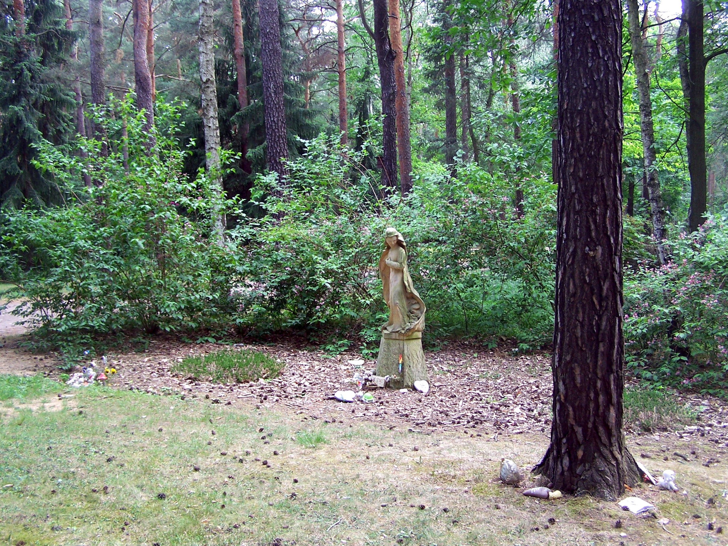 Denkmal Fehlgeburtenanlage auf dem Heidefriedhof in Dresden